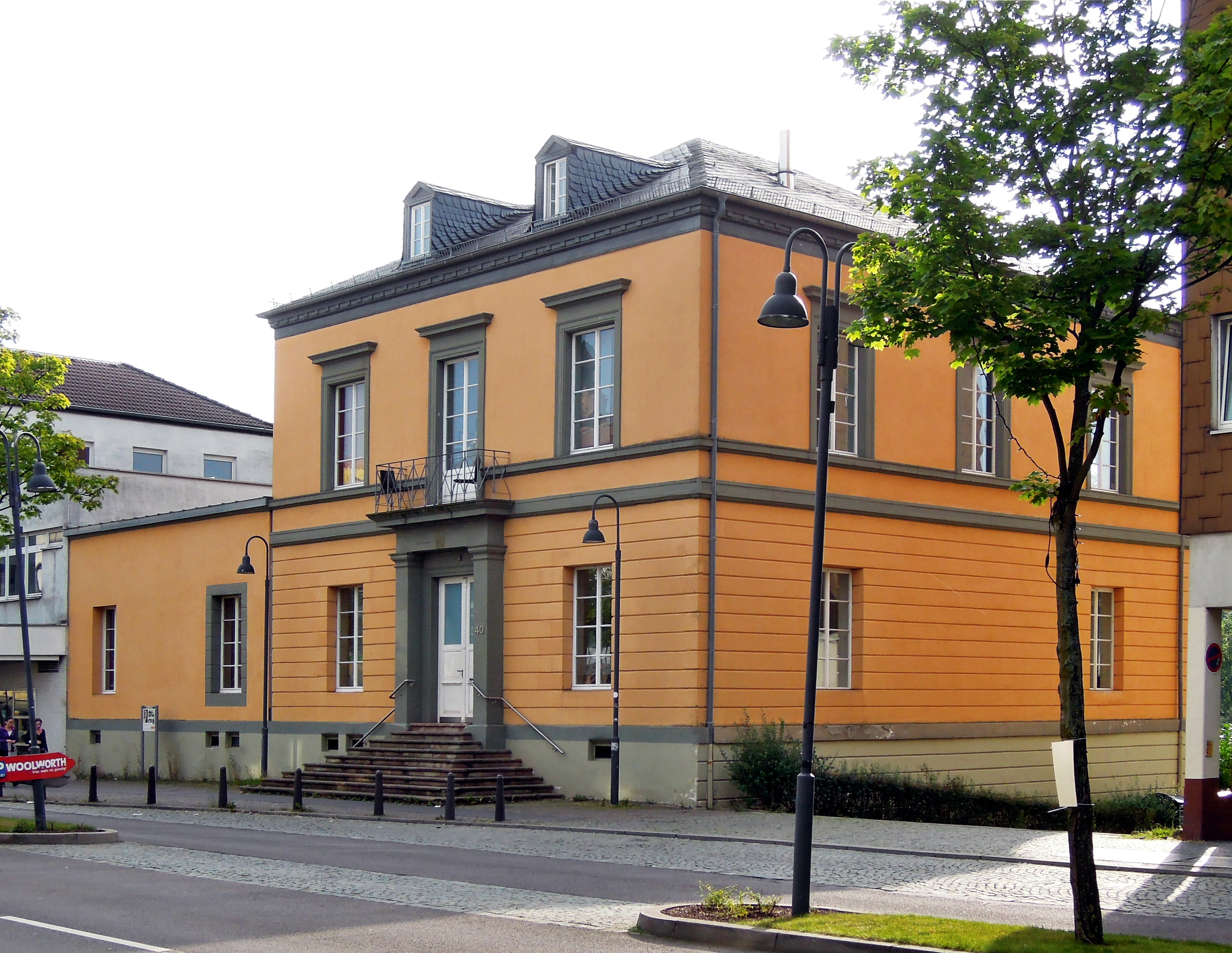 Sulzbachtalstraße 40, Villa Vopelius, 1837, Erweiterung 1864 (Einzeldenkmal)